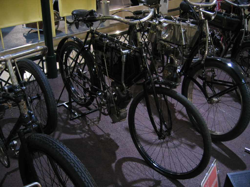 Moto légere Peugeot 1902 - 1 cyl - Musée Peugeot Sochaux